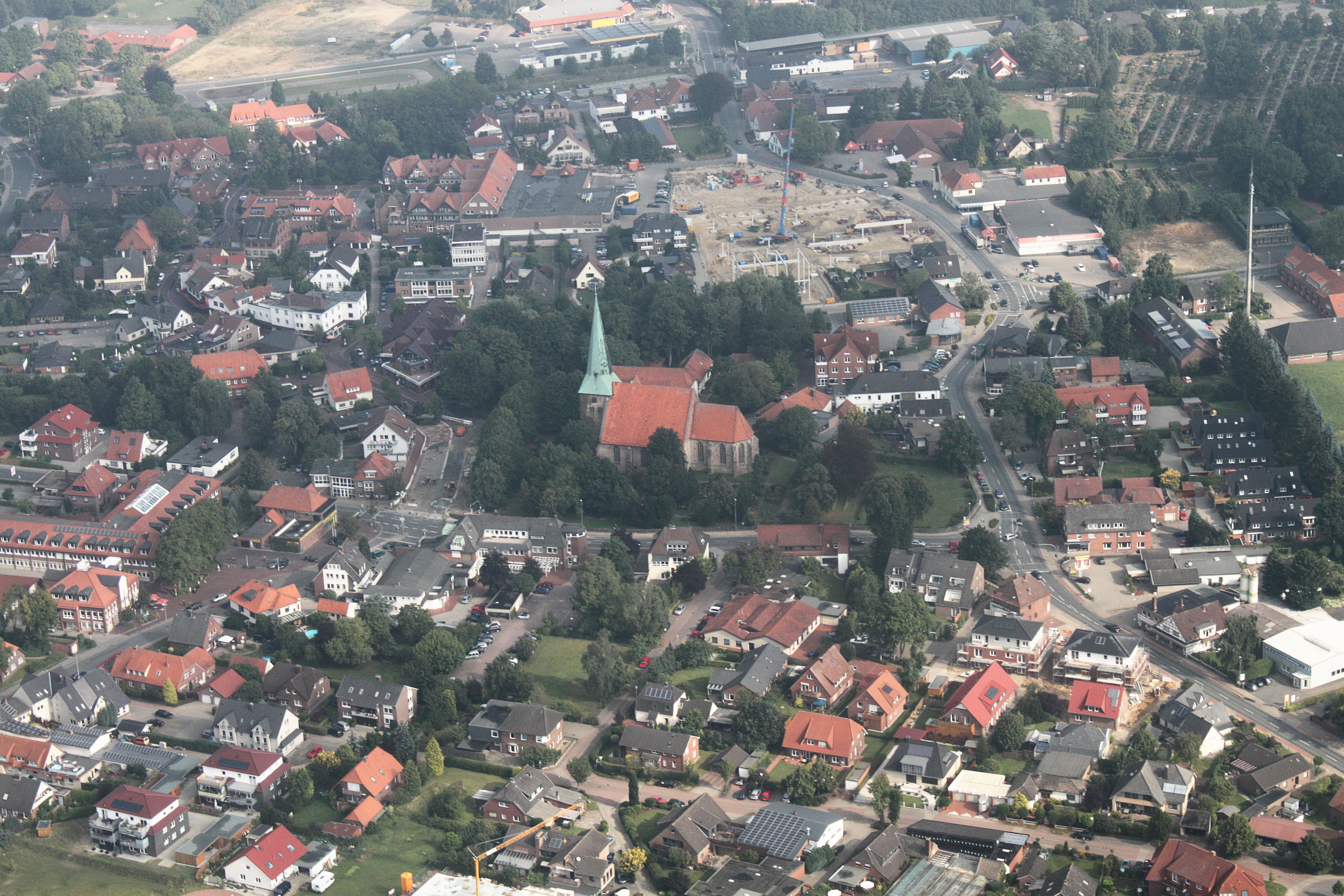 Flug über Ganderkesee; von West nach Südost: von Atals Maschinen, über Freibad, Richtung Umspannwerk